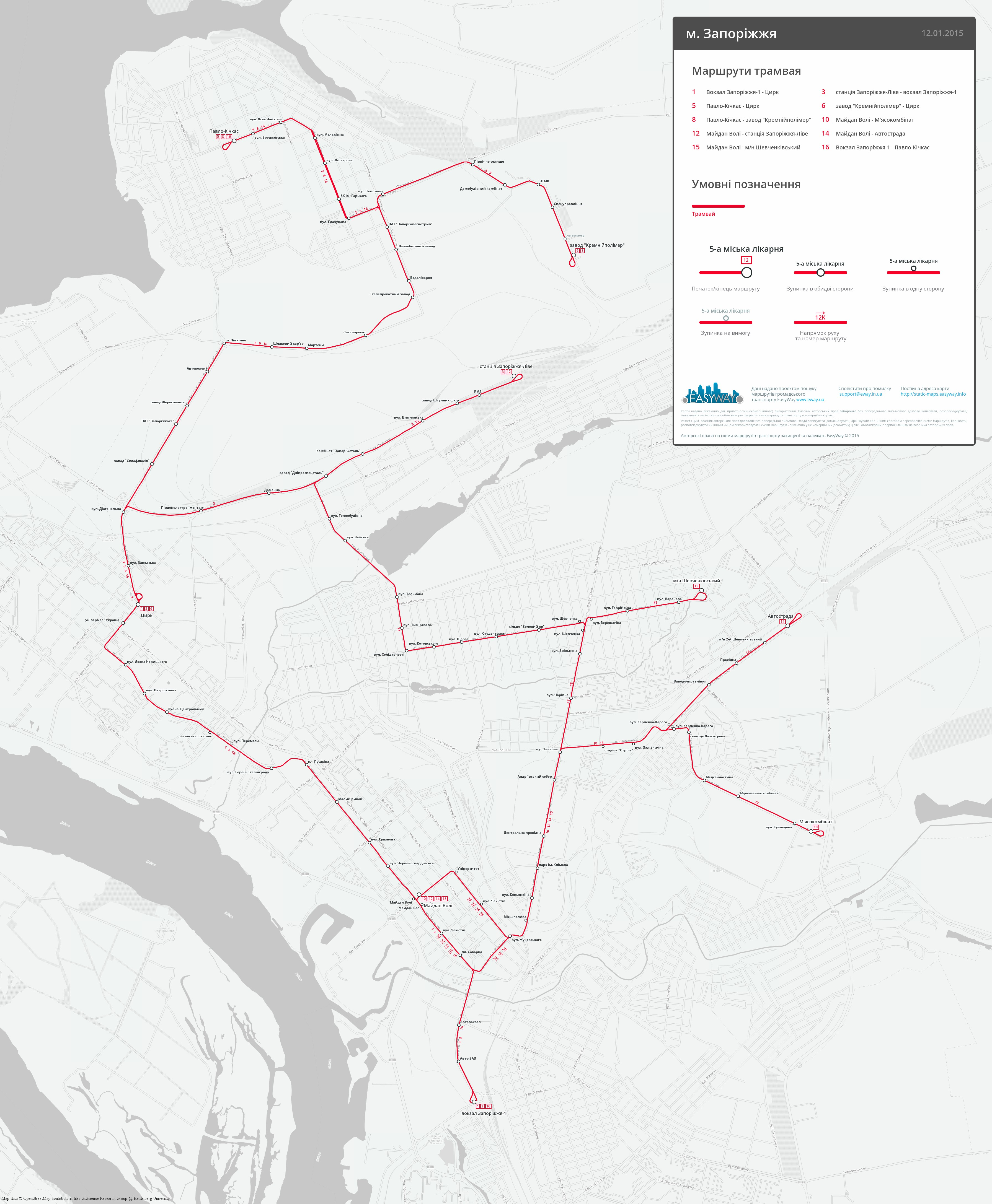 Схема трамвайних маршрутів у місті Запоріжжя